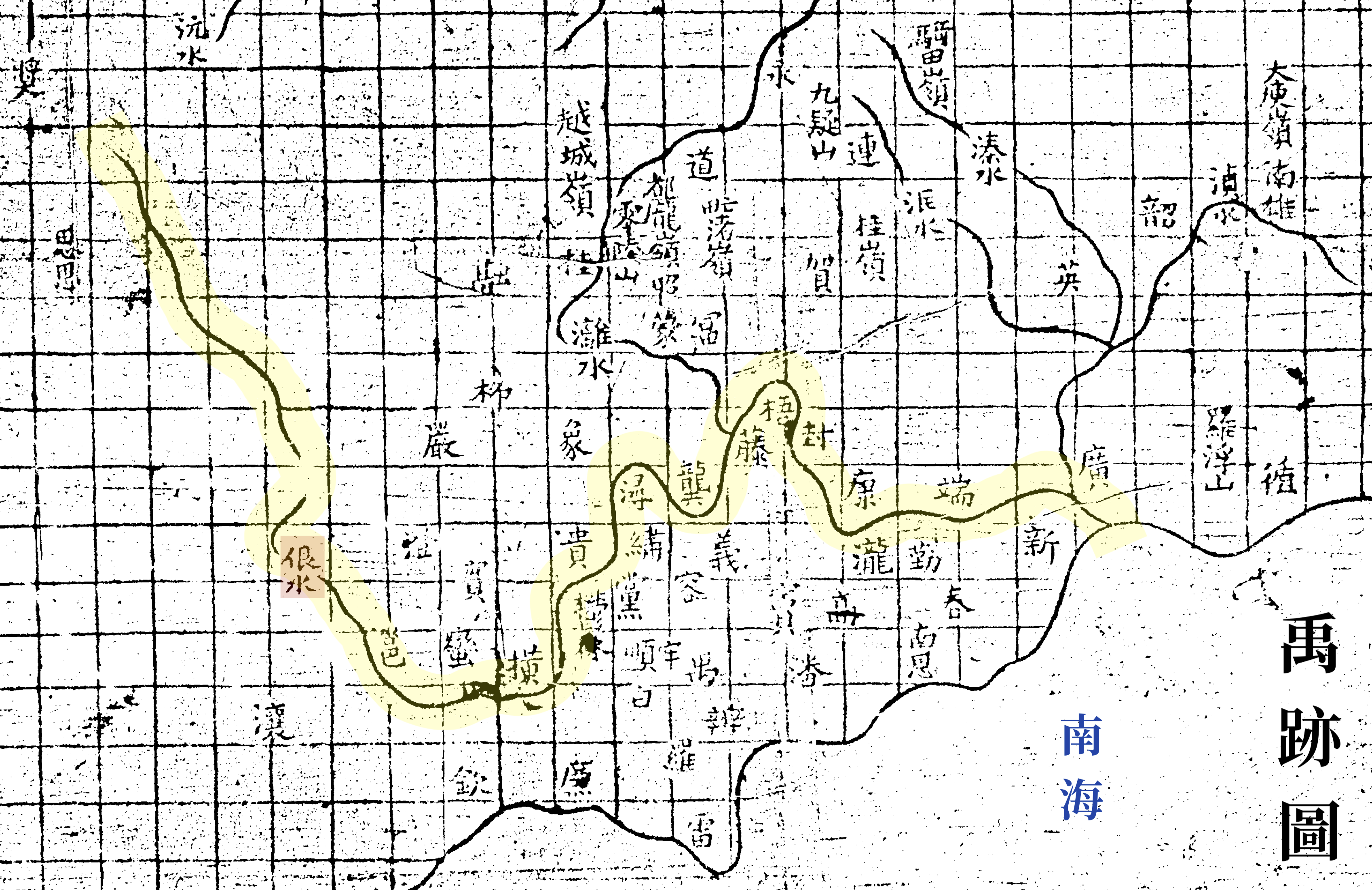 粵語: 禹跡圖中之泿水。泿水圖中寫佷水。